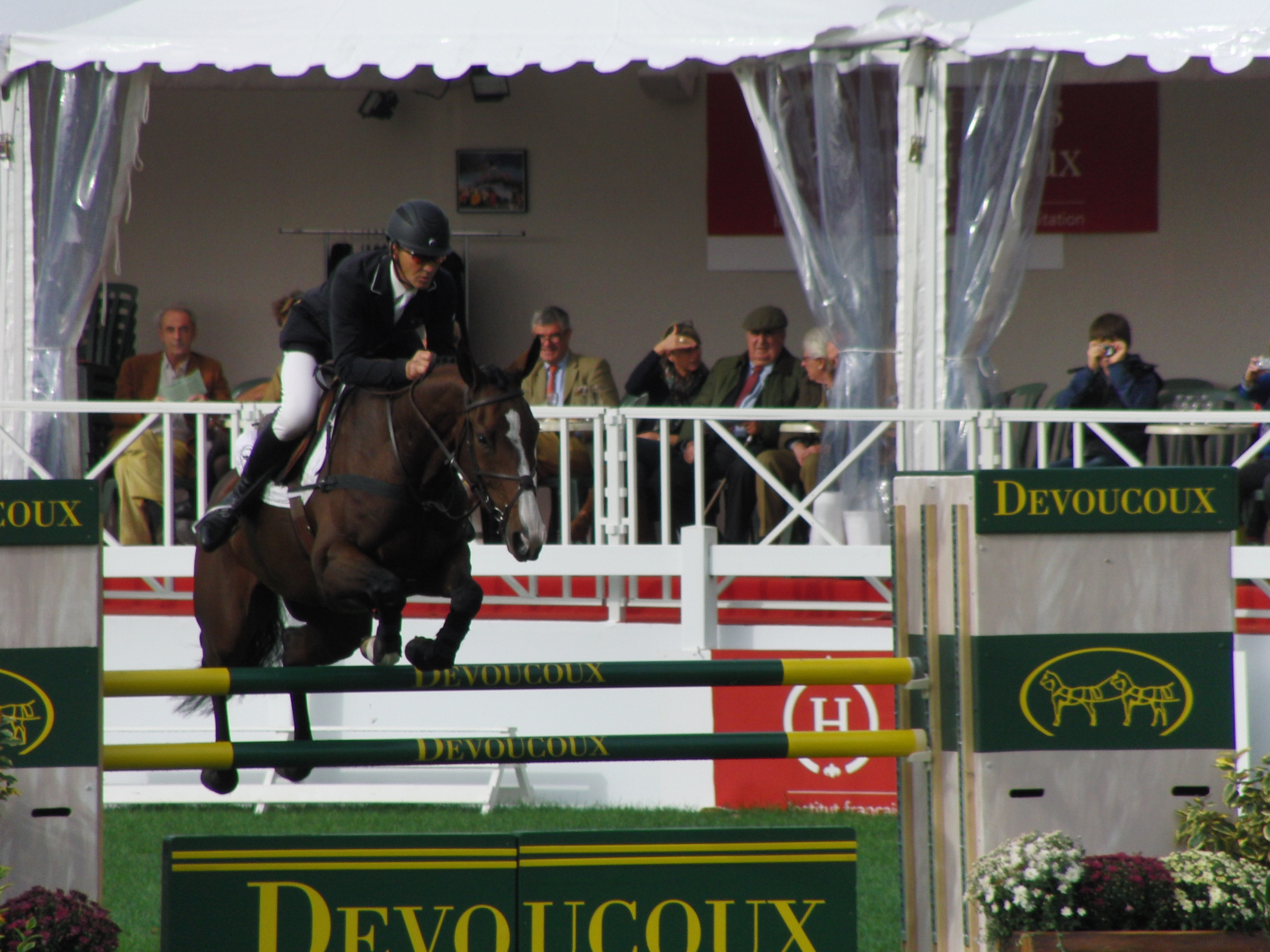 Andrew Nicholson et Jet Set au Mondial du Lion 2013 - épreuve de saut d'obstacles - Le Lion-d'Angers, France